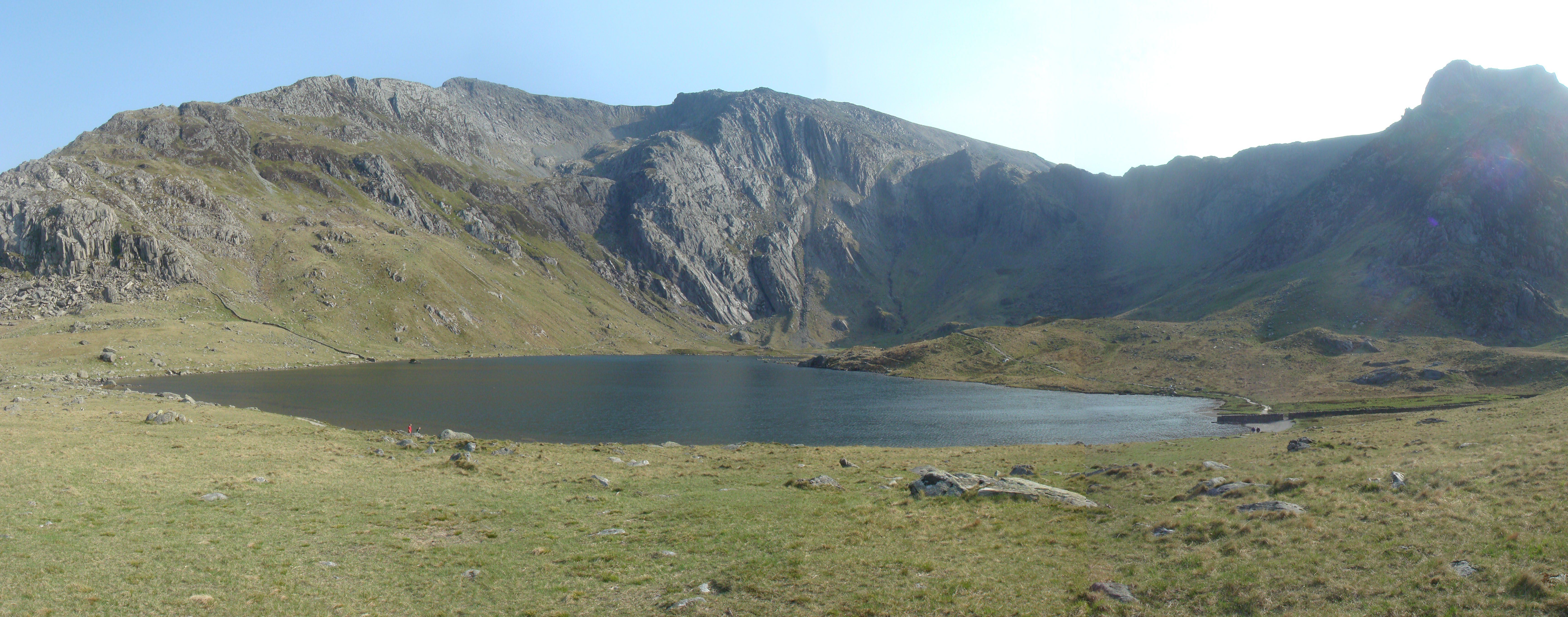 Photo of Llyn Idwal in Snowdonia